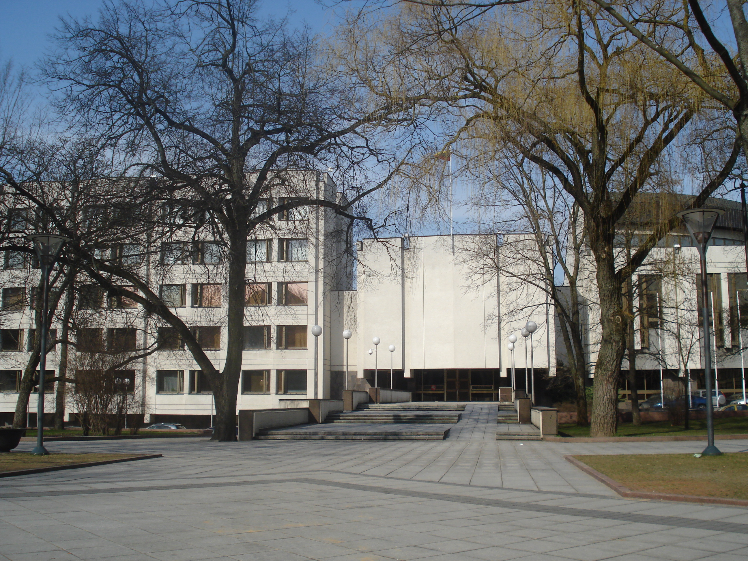 Дворец правительства Литвы (бывший ЦК КПЛ) Lietuvos vyriausybės rūmai (buv. LKP CK). V. Kudirkos (buv. Savivaldybės) aikštė (Gedimino pr. 11). Architektas – Vytautas Edmundas Čekanauskas (1982). Building of the Government of Lithuania. Project by Vytautas Edmundas Čekanauskas (1982)